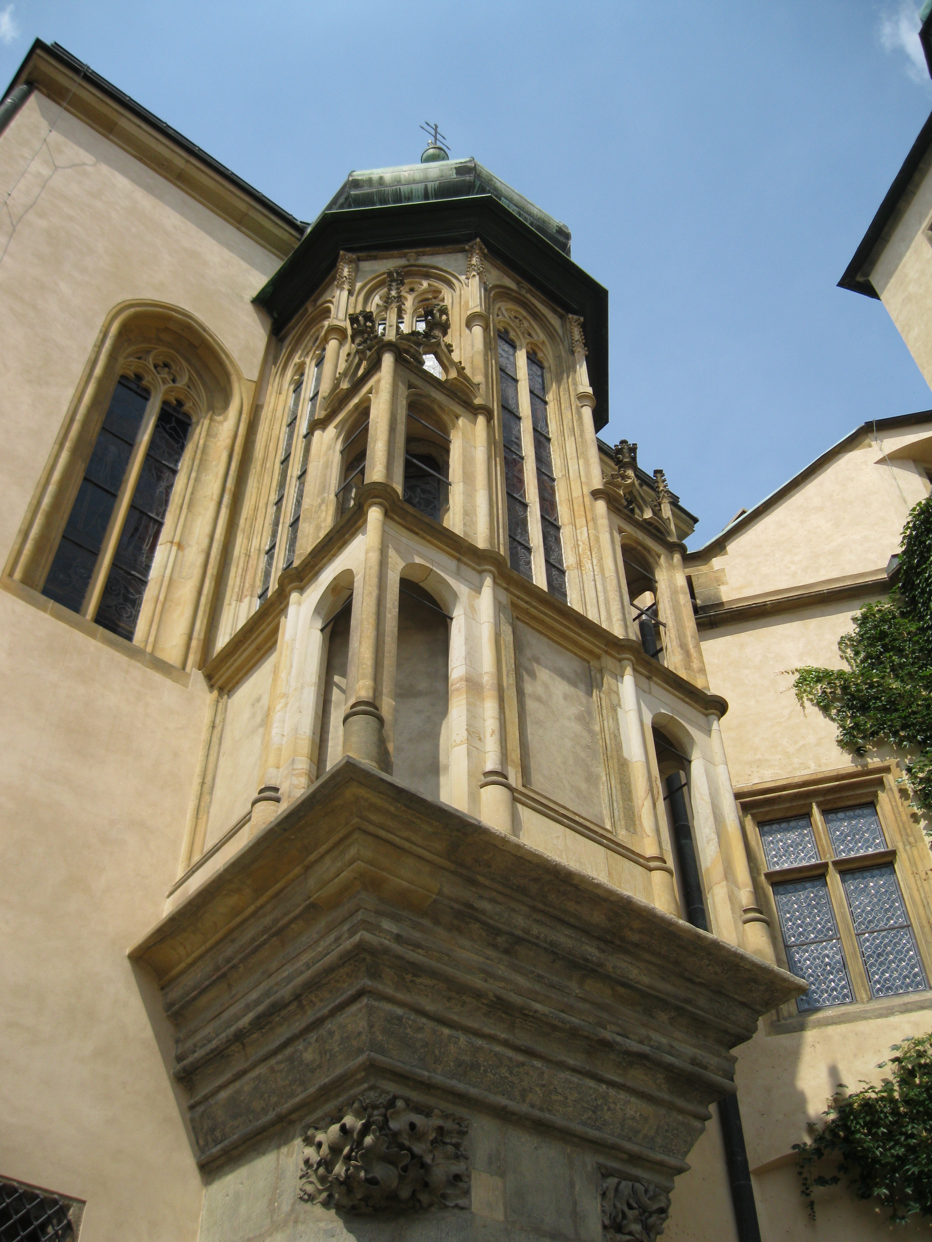 Palác Vlašský dvůr (Kutná Hora)